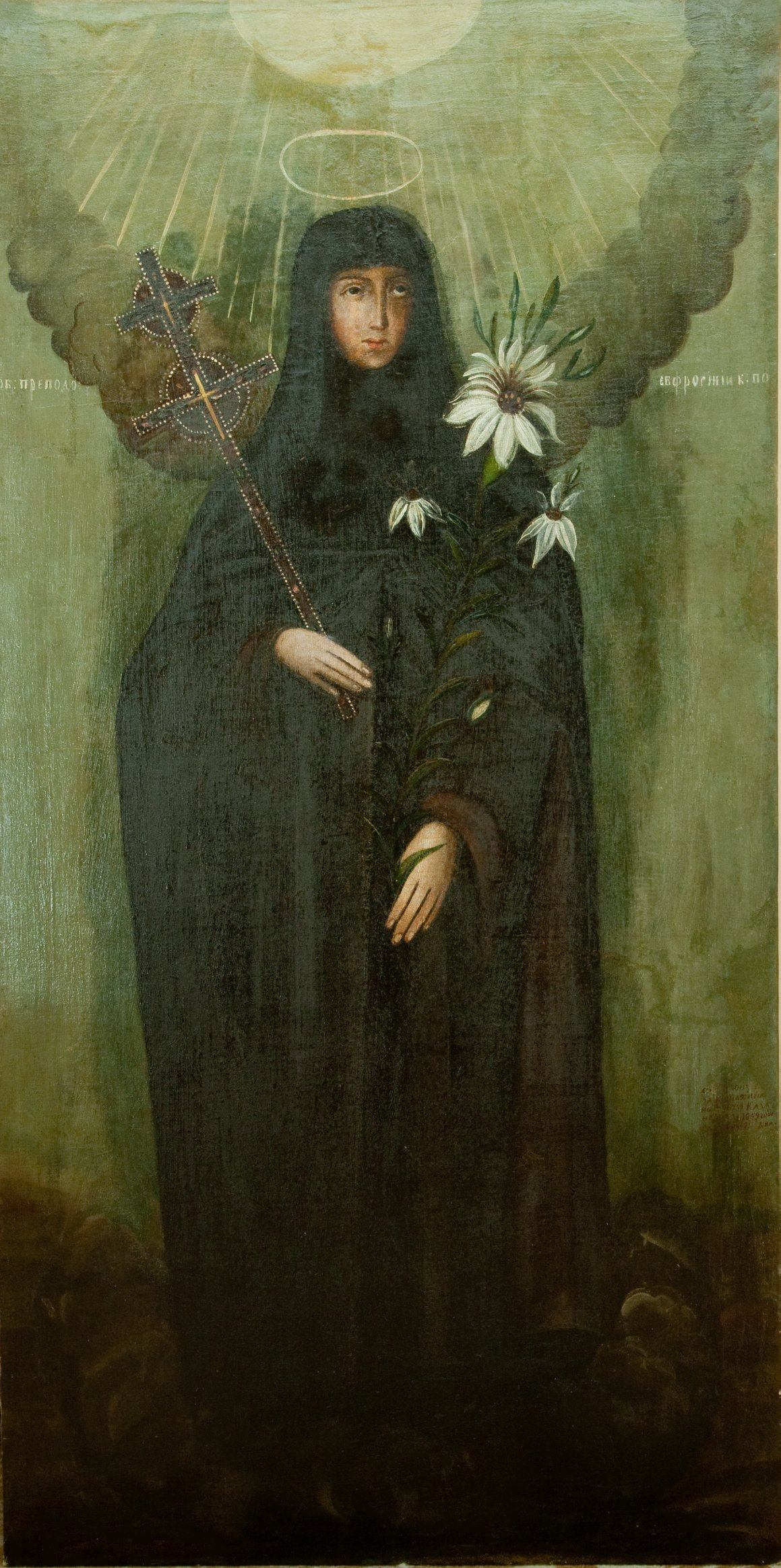 Музей: Гродзенскі дзяржаўны музей гісторыі рэлігіі Тып: выяўленчыя крыніцы Від: жывапіс Прадметнае імя: абраз Назва/аўтарская назва: Святая Еўфрасіння Полацкая Аўтары: Калашнікава Нафонта; Матэрыялы: палатно; Тэхналогіі стварэння: жывапіс алейны; Дата стварэння: 1859/12/19 Месца стварэння: Беларусь Памеры: h =155,5 см; b =79 см Знойдзены ў могілкавай царкве ў Вілейскім раёне. Адрэстаўраваны Уладзімірам Кіслым. Рэдкі прыклад падпіснога абраза. Маляваўся праваслаўнай манашкай неўзабаве па скасаванні царкоўнай уніі, але яе ўплыў адчуваецца ў манеры пісьма -- святая ў манаскім убранні трымае крыж Лазара Богшы і лілеі (сімвал цнатлівасці ў заходнім мастацтве), над галавой каталіцкі німб.Беларуская (тарашкевіца): Эўфрасіньня Полацкая (Eŭfrasińnia Połackaja), абраз. Дзяржаўны музэй гісторыі рэлігіі ў Горадні